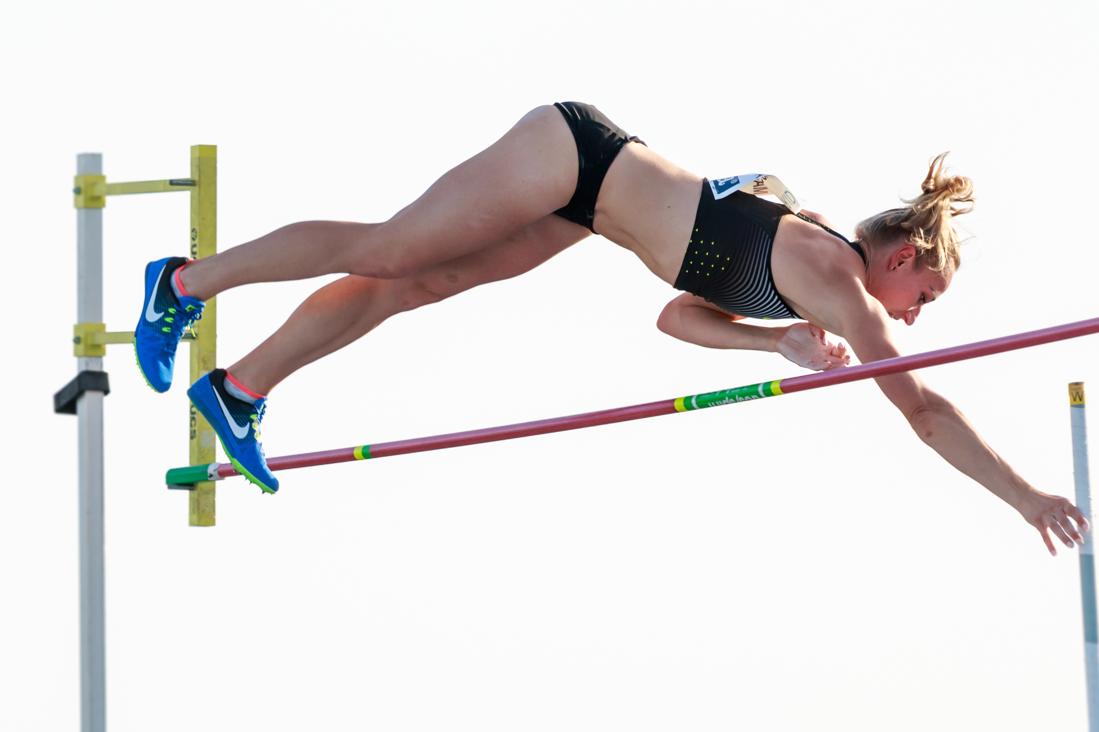 Romana Malacova (CZE). Salto con garrocha. IAAF World Challenge. Meeting Madrid 2017. Moratalaz, Madrid.